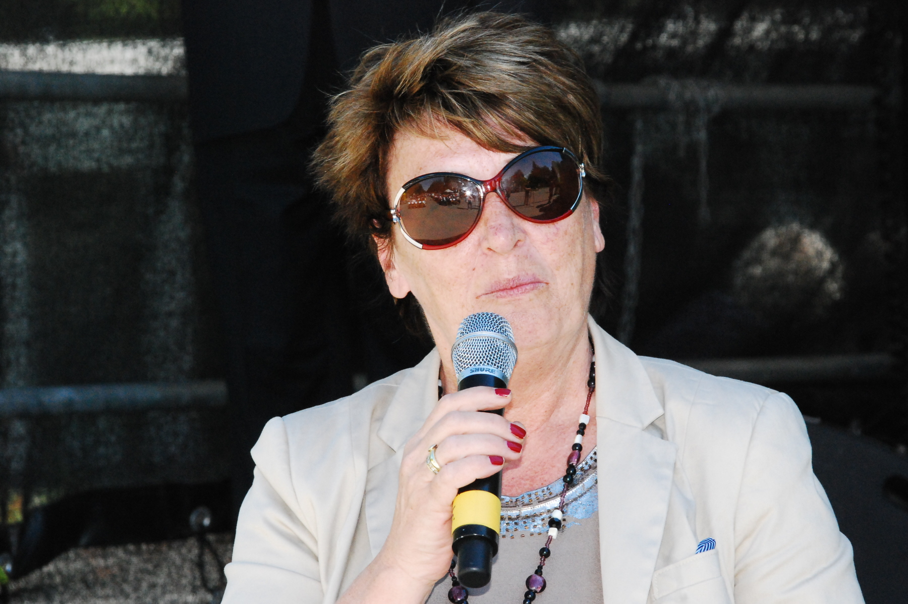 Renate Angerer, Bezirksvorsteherin von Simmering, anlässlich des Konzerts "Nachklang" auf dem Wiener Zentralfriedhof